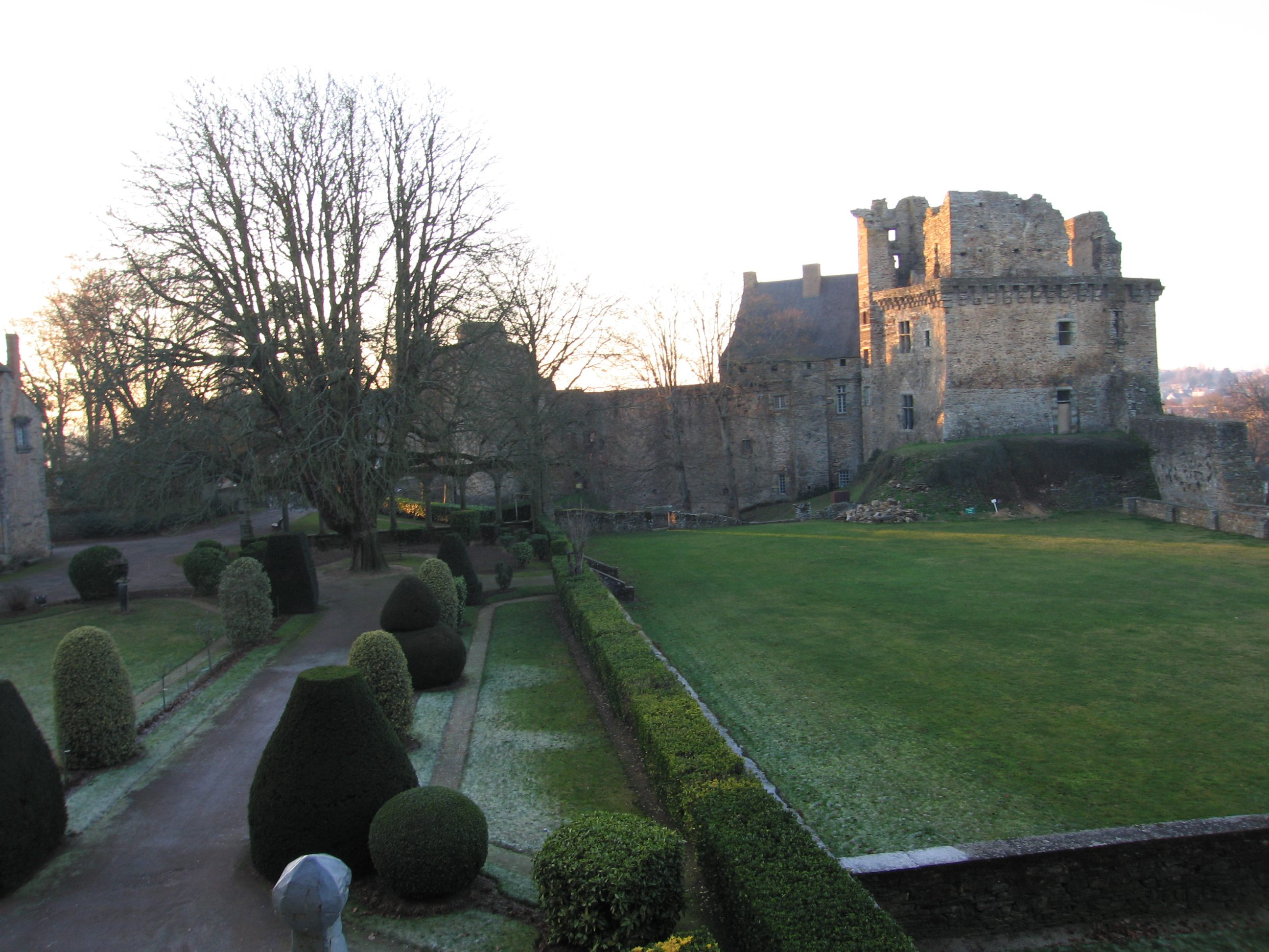 Donjon du château de Châteaubriant